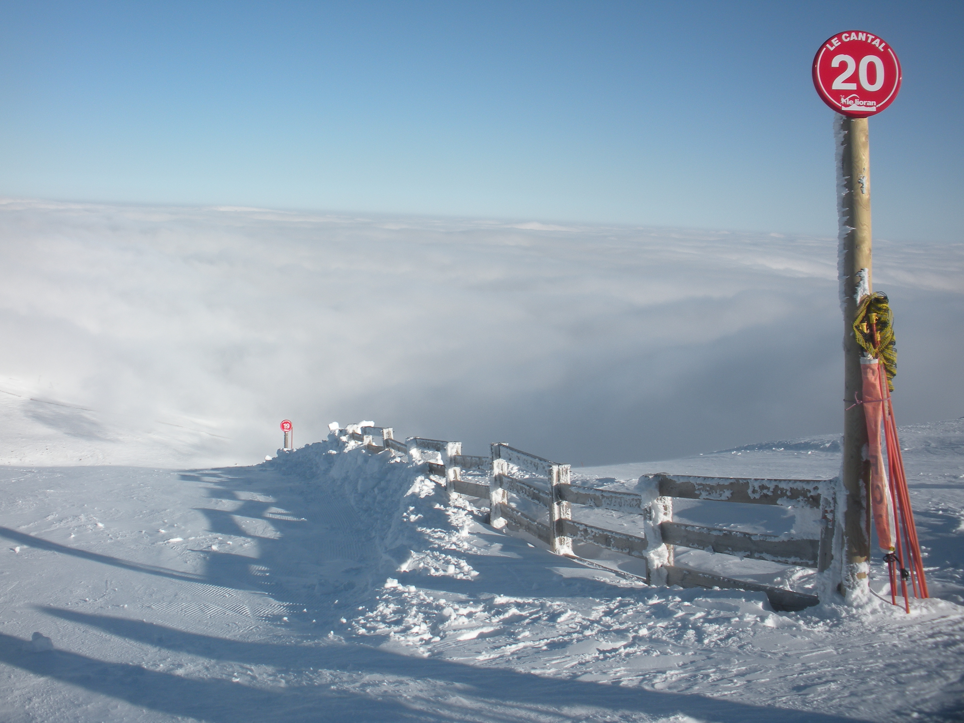 La piste rouge du Cantal à coté du sommet du Plomb du Cantal (1855 m)